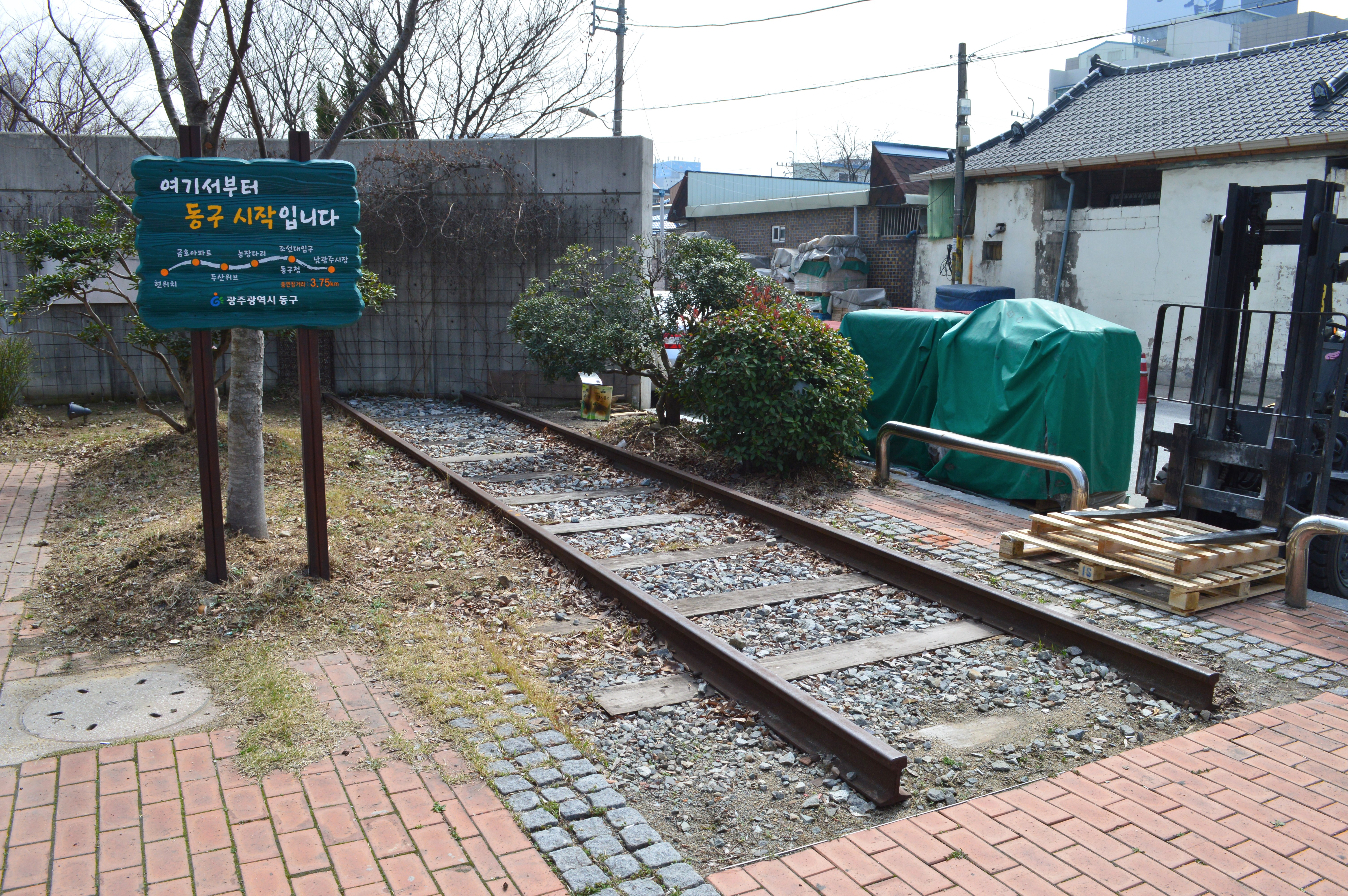 旧慶全線 光州駅付近廃線